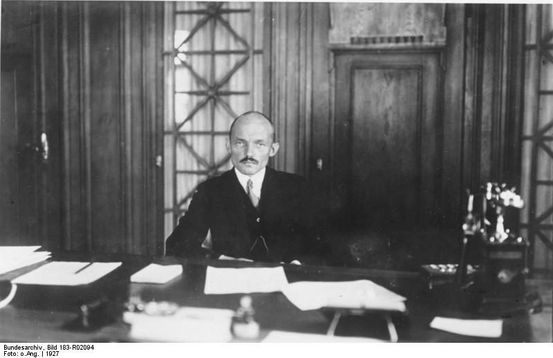 Zentralbild Prof. Dr.-Ing. h.c. Claude Dornier, Flugzeugkonstrukteur, geb. 14.5.1884 in Kempten/Allgäu; Chef der Dornier-Metallbauten GmbH in Friedrichshafen a.B.; er baute 1922 den Dornier-Wal, 1926 das Dornier-Superwal-Flugzeug und 1929 die "Do X". Aufnahme 1927 12301-27